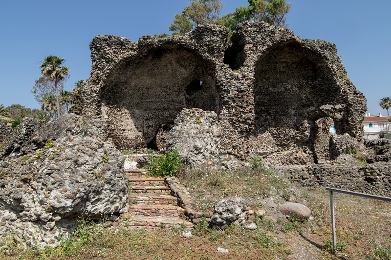 Vista desde el recinto del yacimiento.